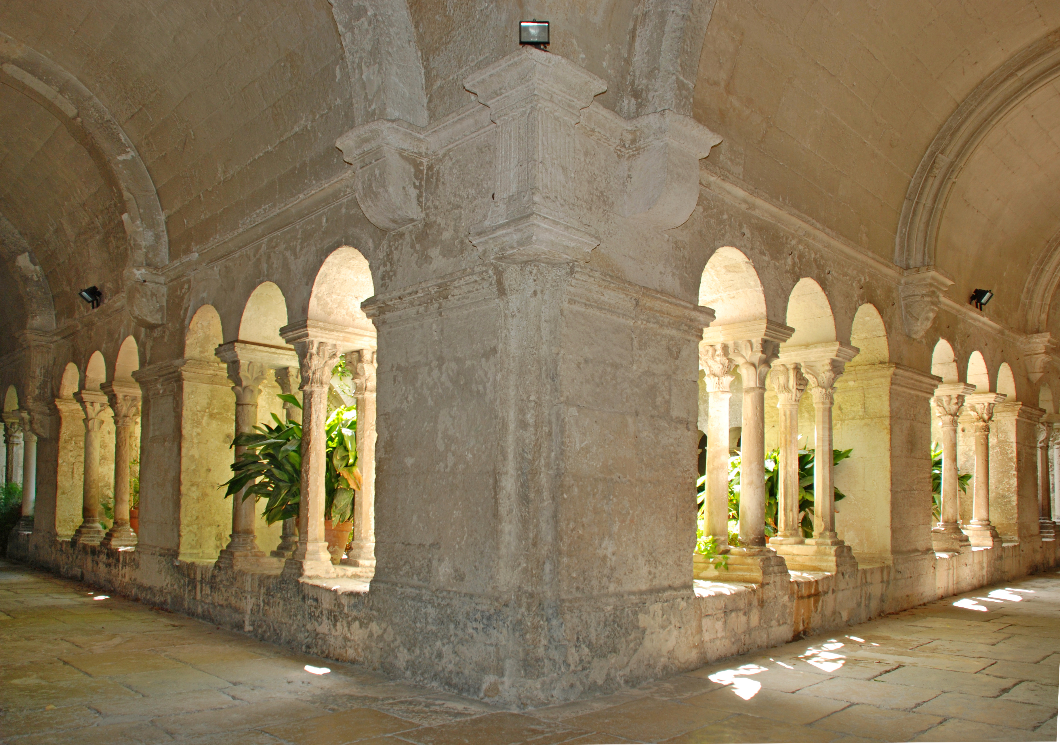 France - Provence - Bouches-du-Rhône - Monastère Saint-Paul-de-Mausole